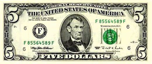 Dólar de 5